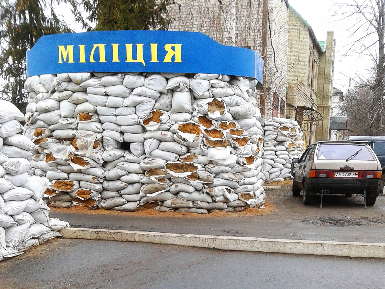 Барікади біля старобільського райвідділу міліції під час Російсько-української війни